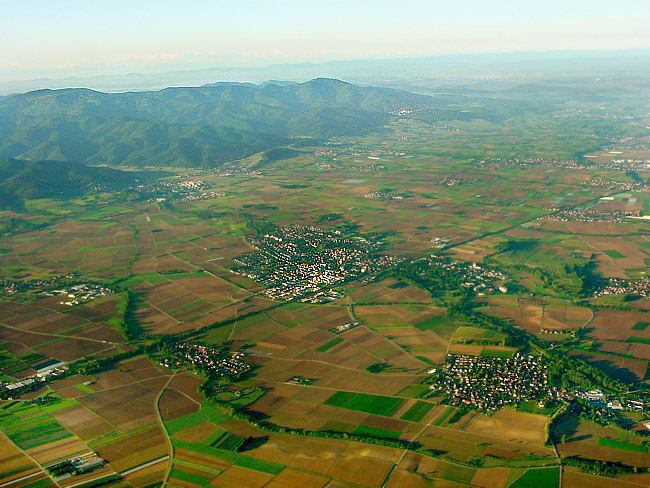 Luftbild vom Schwarzwald und Markgräflerland, Bad Krozingen, aufgenommen bei einer Ballonfahrt. In der Bildmitte die Rheintalbahn.